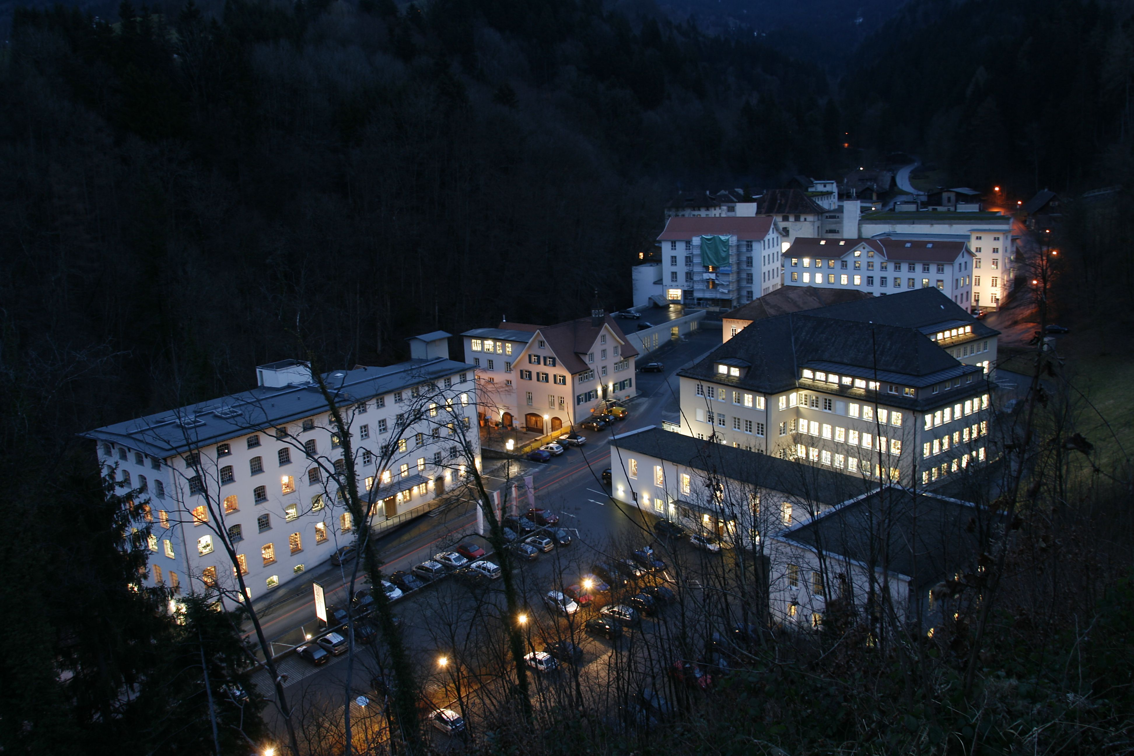 ehemals Textilfabrik der Firma F.M.Hämmerle im Steinebach; Dornbirn, Vorarlberg.